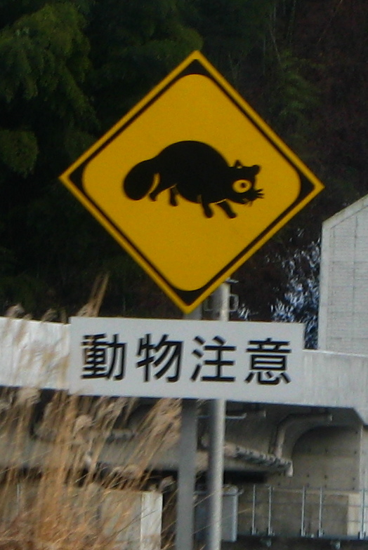 Tanuki Crossing